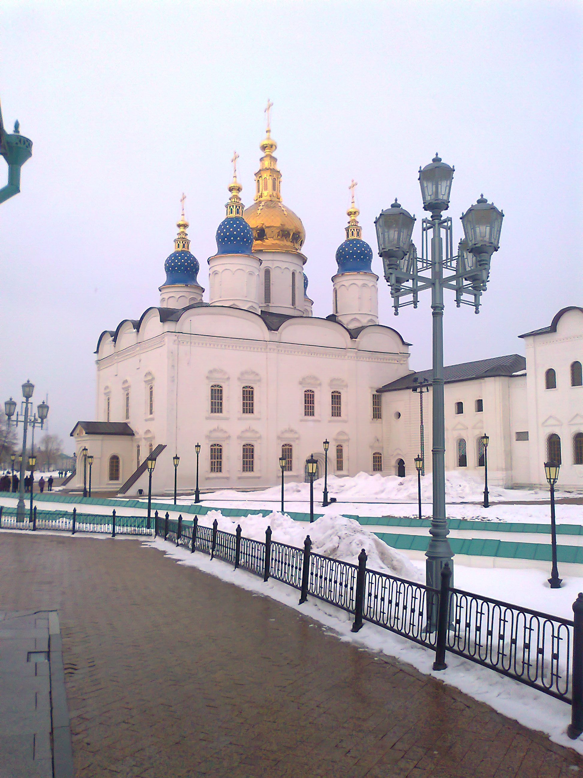 (Тюменская область, Тобольск, Красная площадь, 2)